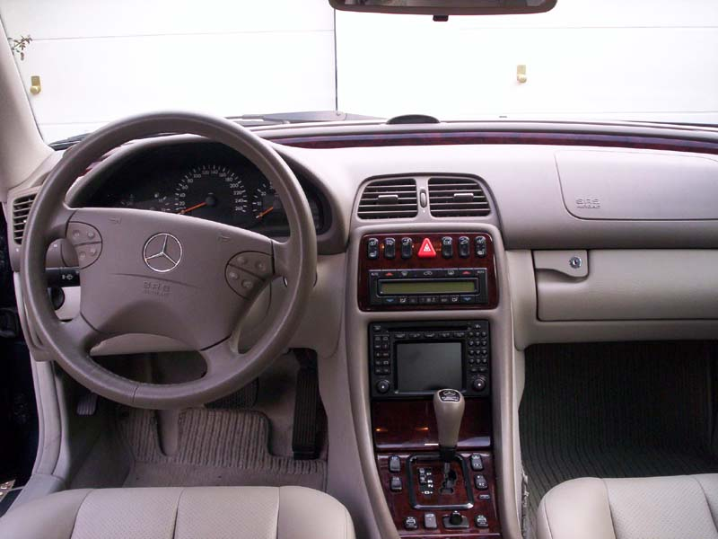 Luxuriöser Innenraum